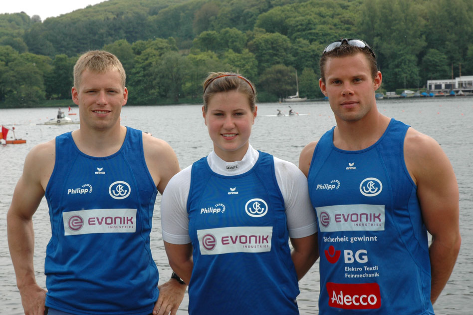 Drei der erfolgreichsten Sportler des KC Wiking Bochum: Matthias Ebhardt, Lara Daniel und Stephan Breuing